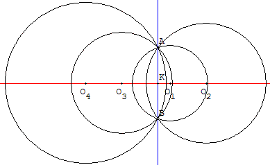 Faisceau de cercles à points de base